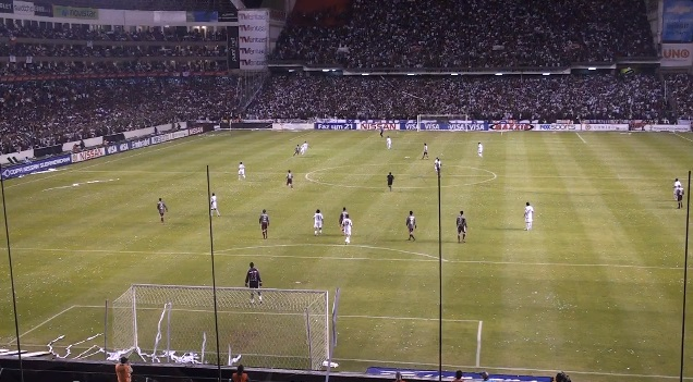 Final Copa Sudamericana 2009: Liga de Quito vs Fluminense